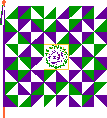 Bandera de Garay, en Vizcaya (España)